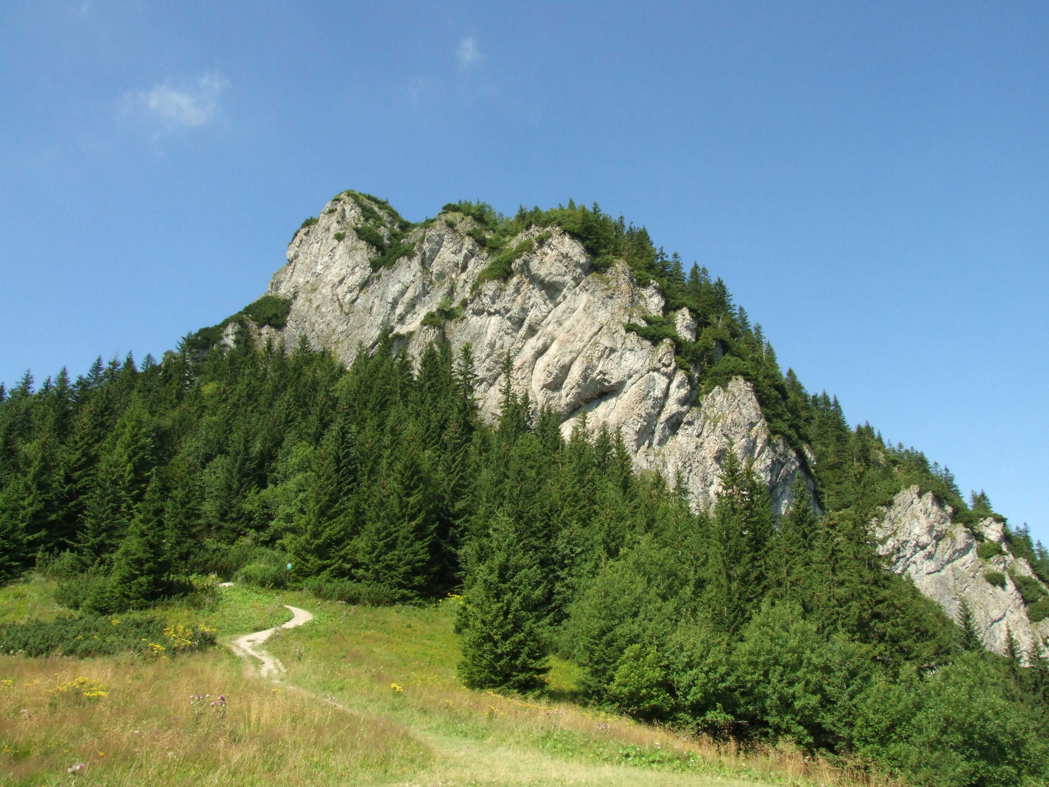 Mały Rozsutec